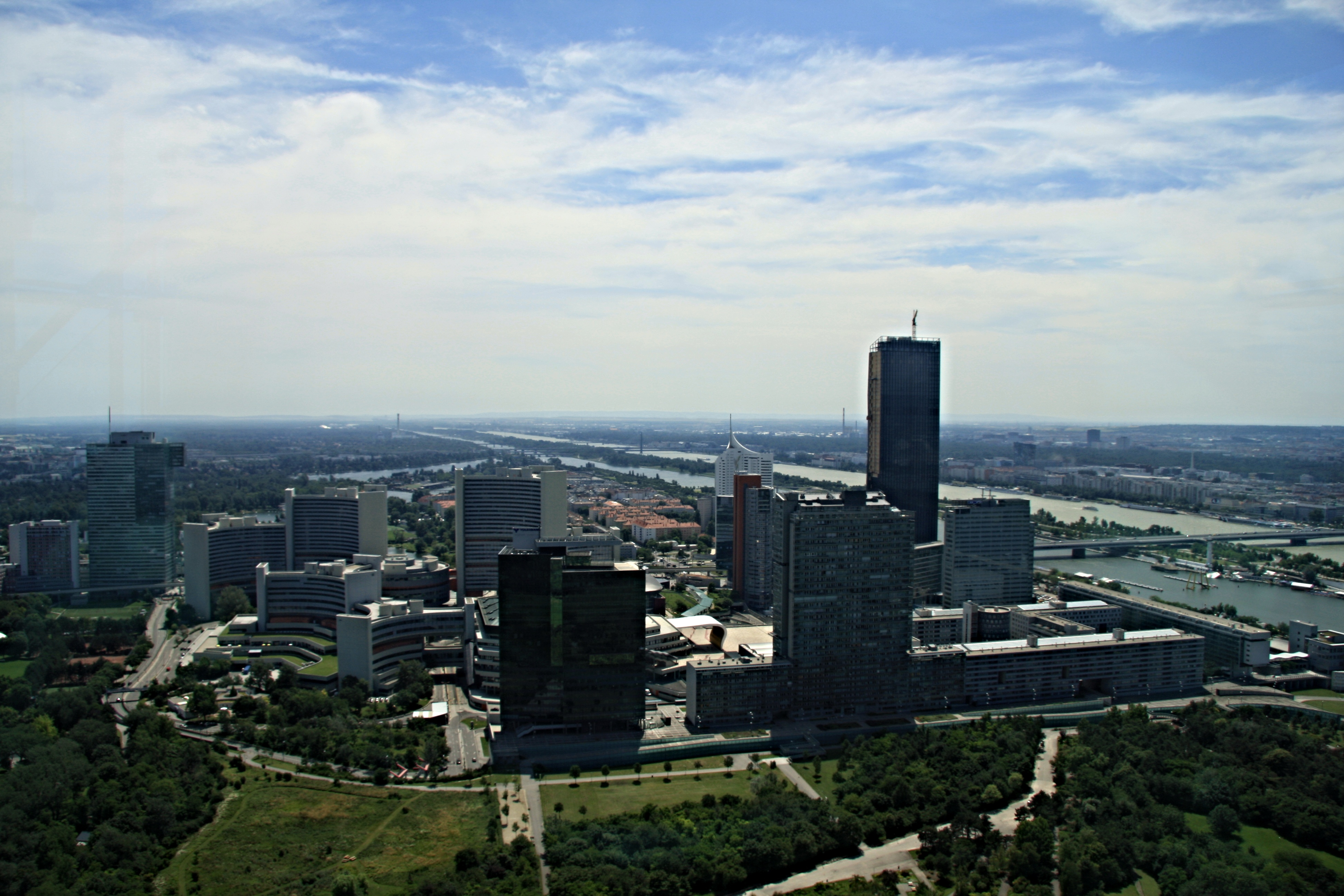 Aussicht vom Donauturm Richtung Süd Osten